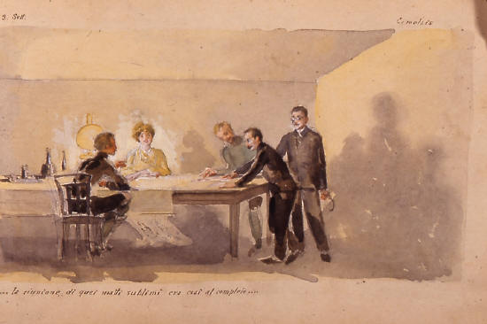 Das Aquarell Napoleone Cozzi zeigt vier Männer und eine Frau bei der Besprechung für die am 17.9.1902 durchgeführte Erstbesteigung des Campanile di Val Montanaia. Der am Tisch stehende ist Victor Wolf von Glanvell mit seiner Frau Maria Theresia Muschin Edle von Ebengreuth (Kunstmalerin). Vermutlich auch auf dem Bild: Karl von Saar.